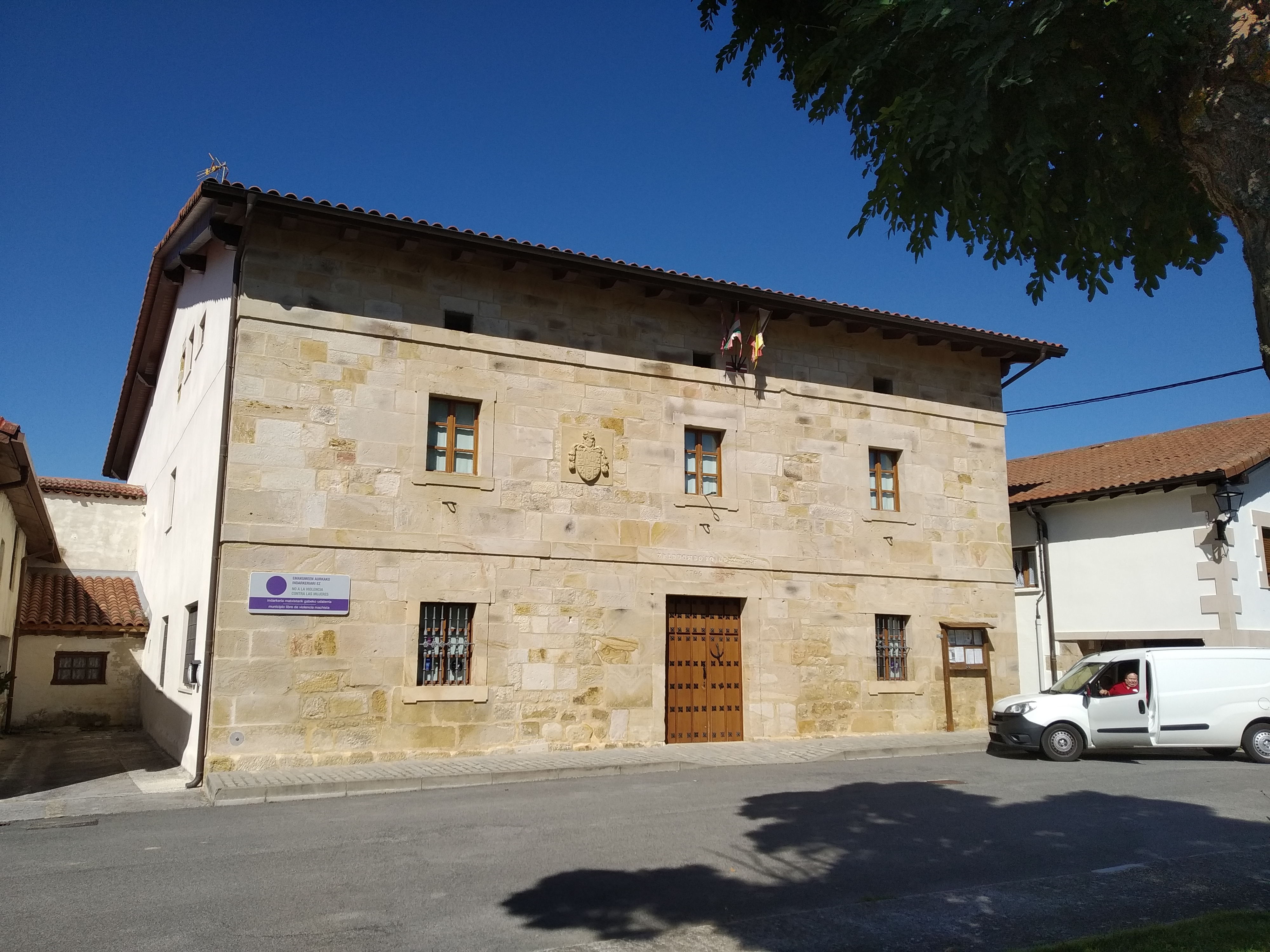 Zalduondo